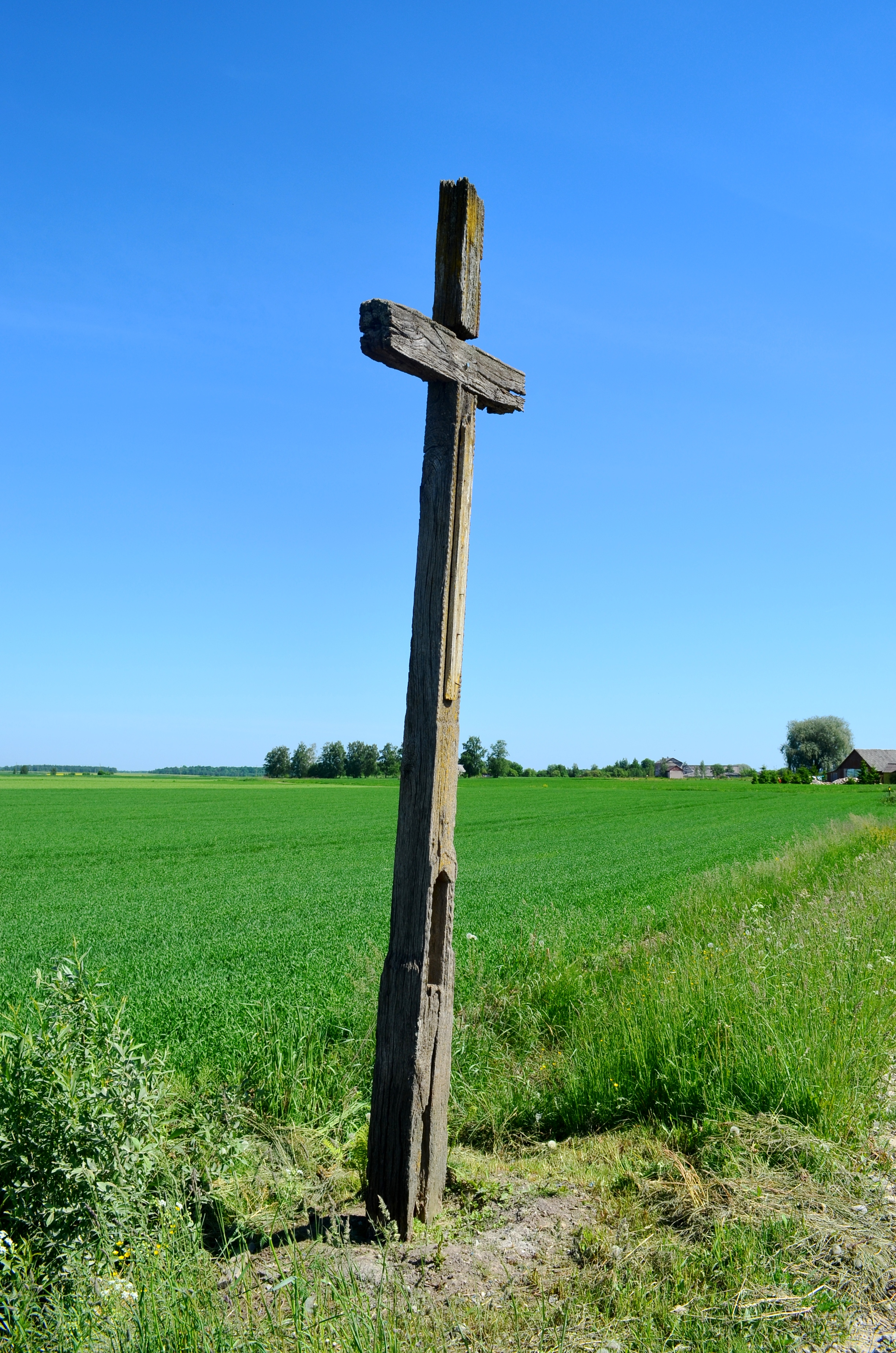 Pakelės kryžius (stat. 1918 m.), Preičiūnai, Pakruojo raj.